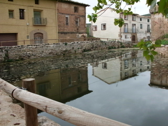 Aragonés: Balsa d'o lugar de Morrano